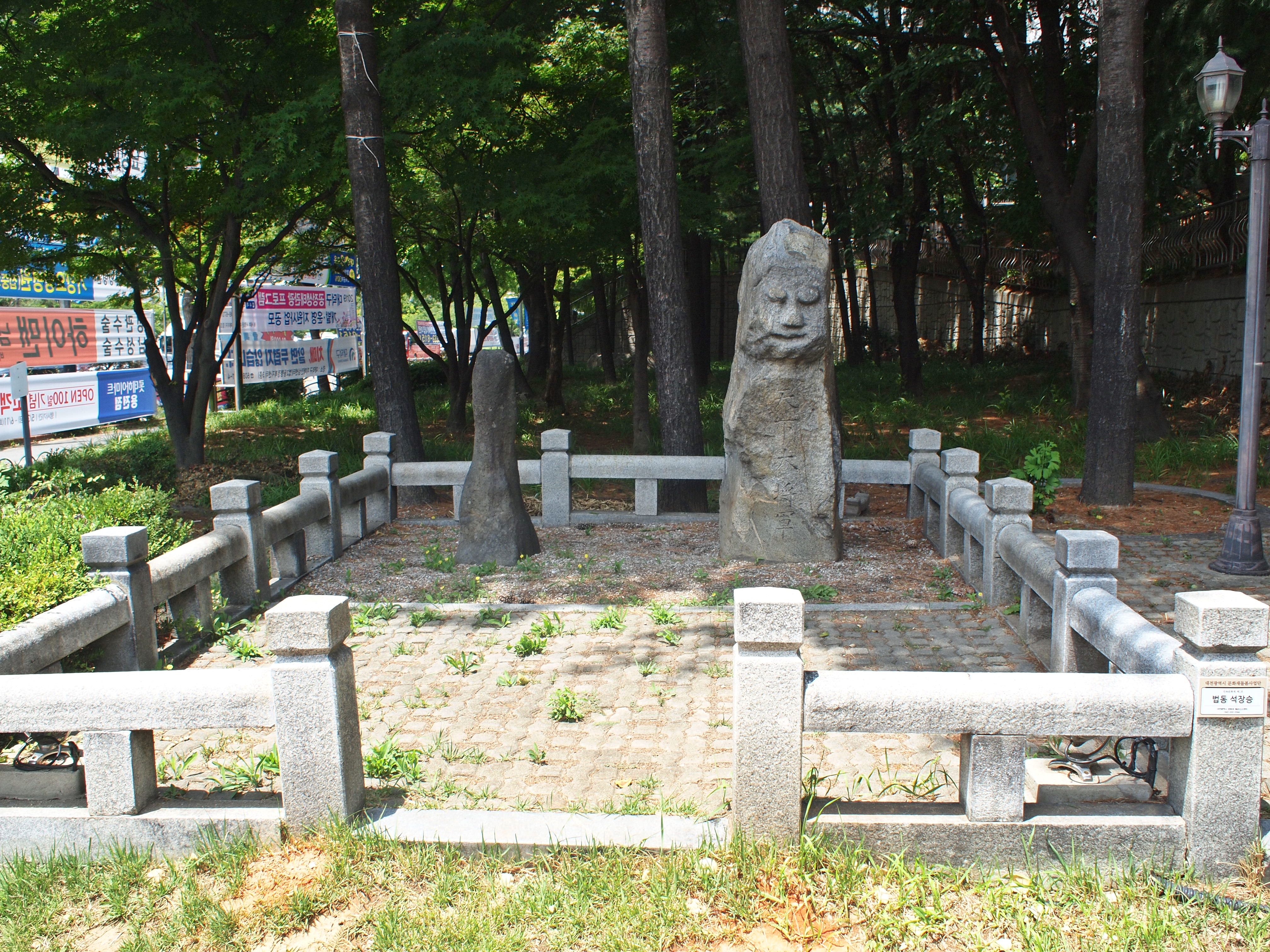 Stone Guardian Posts of Beop-dong